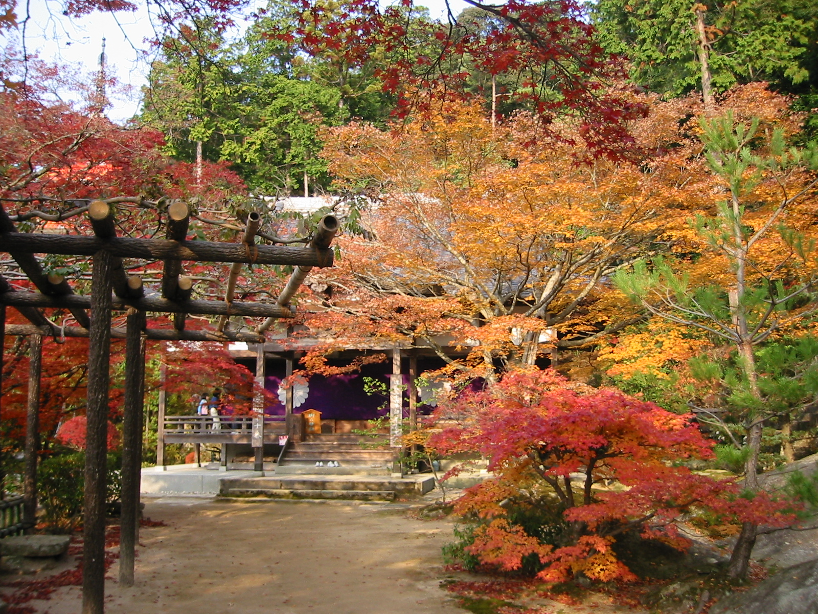 神戸 獨鈷山鏑射寺 護摩堂